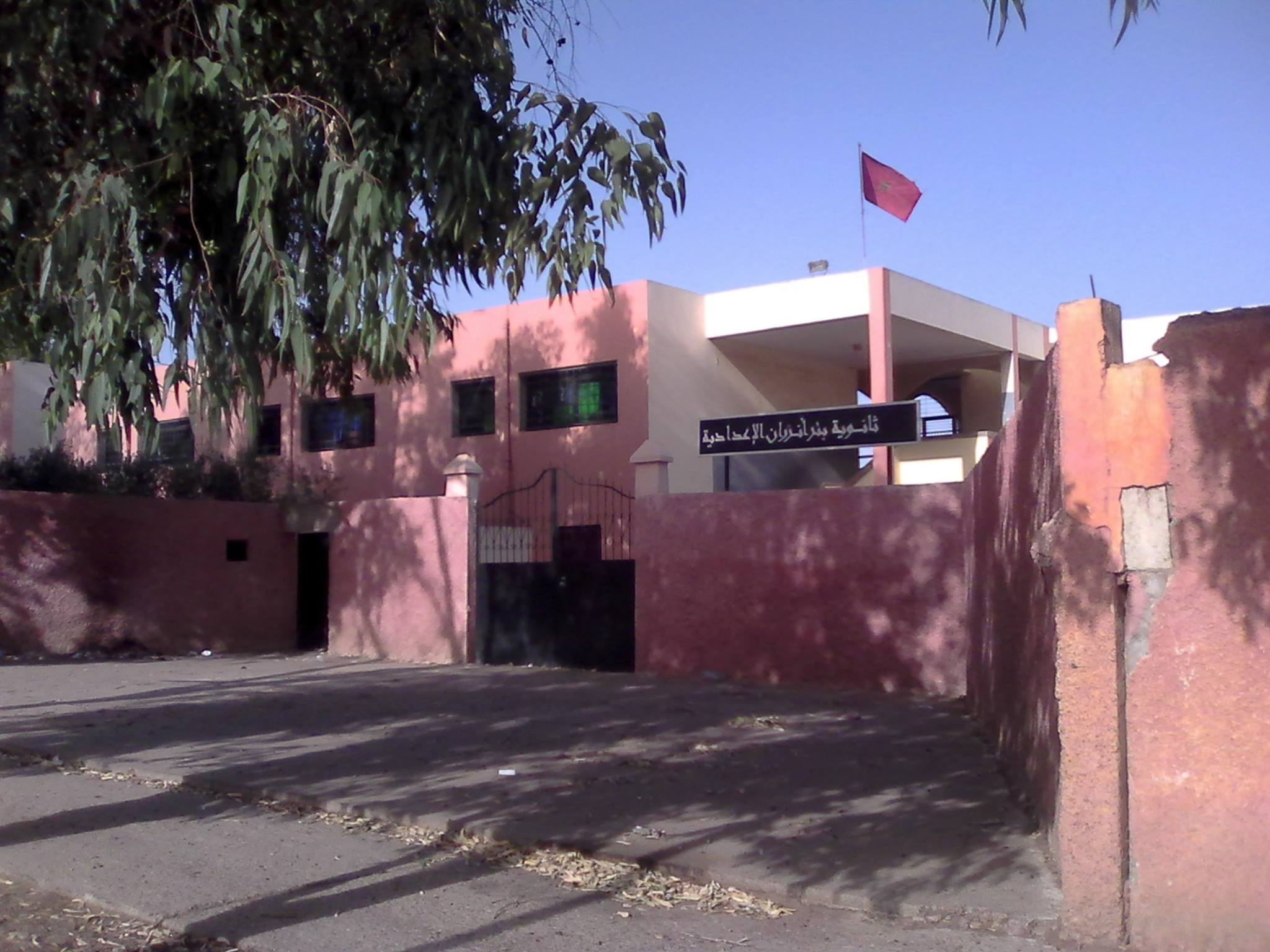 مدرسة ثانوية بسيدي حجاج